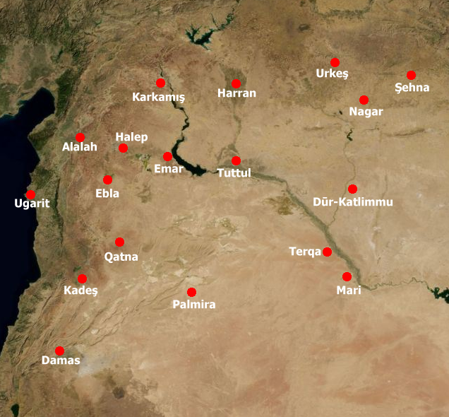 Syria2mil.JPG dosyasının Türkçeleştirilmiş hali.